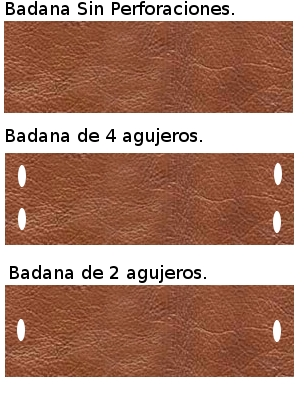 Badana perforada